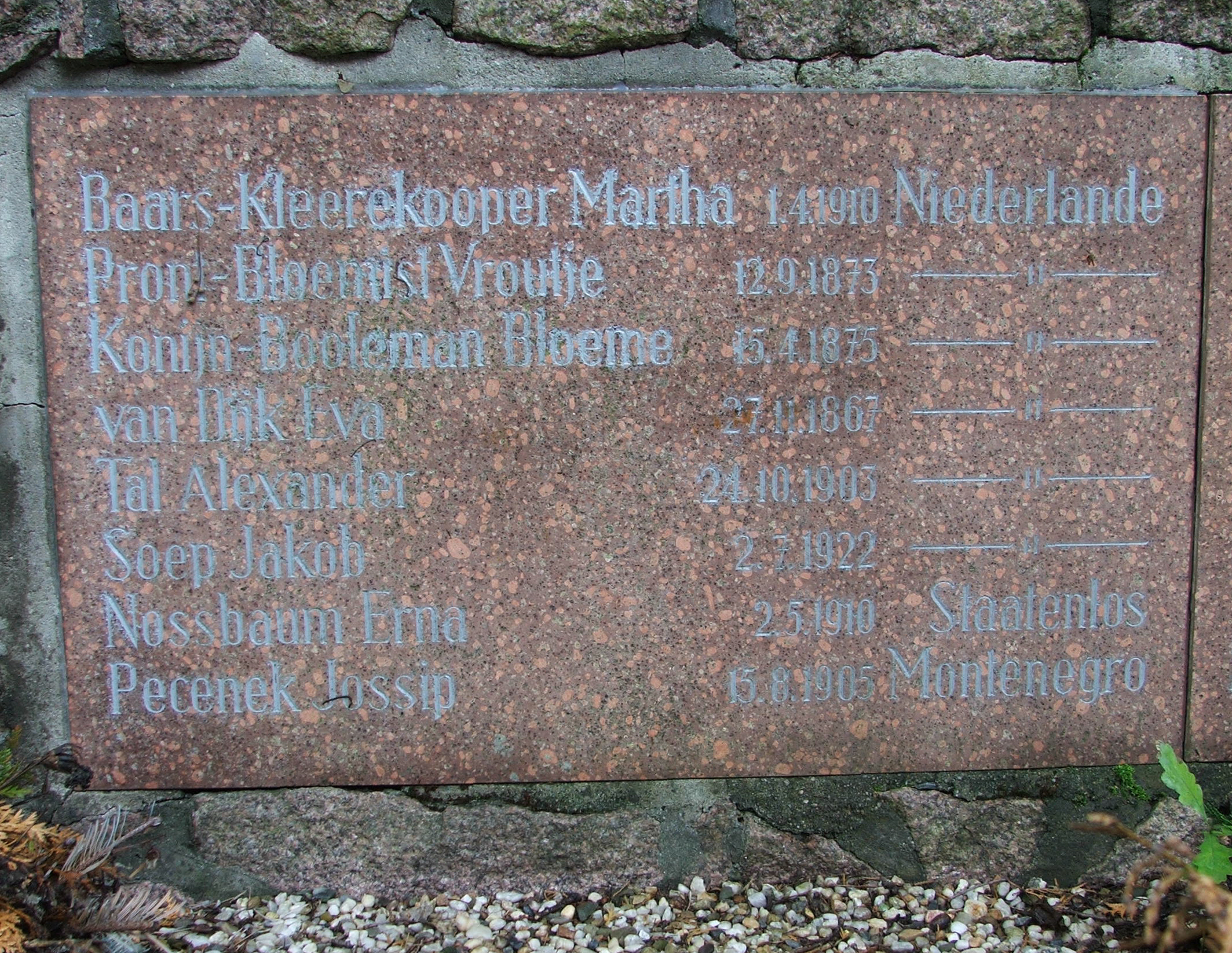 Teil des Grabmals am Kilometer 101,6 bei Langennaundorf